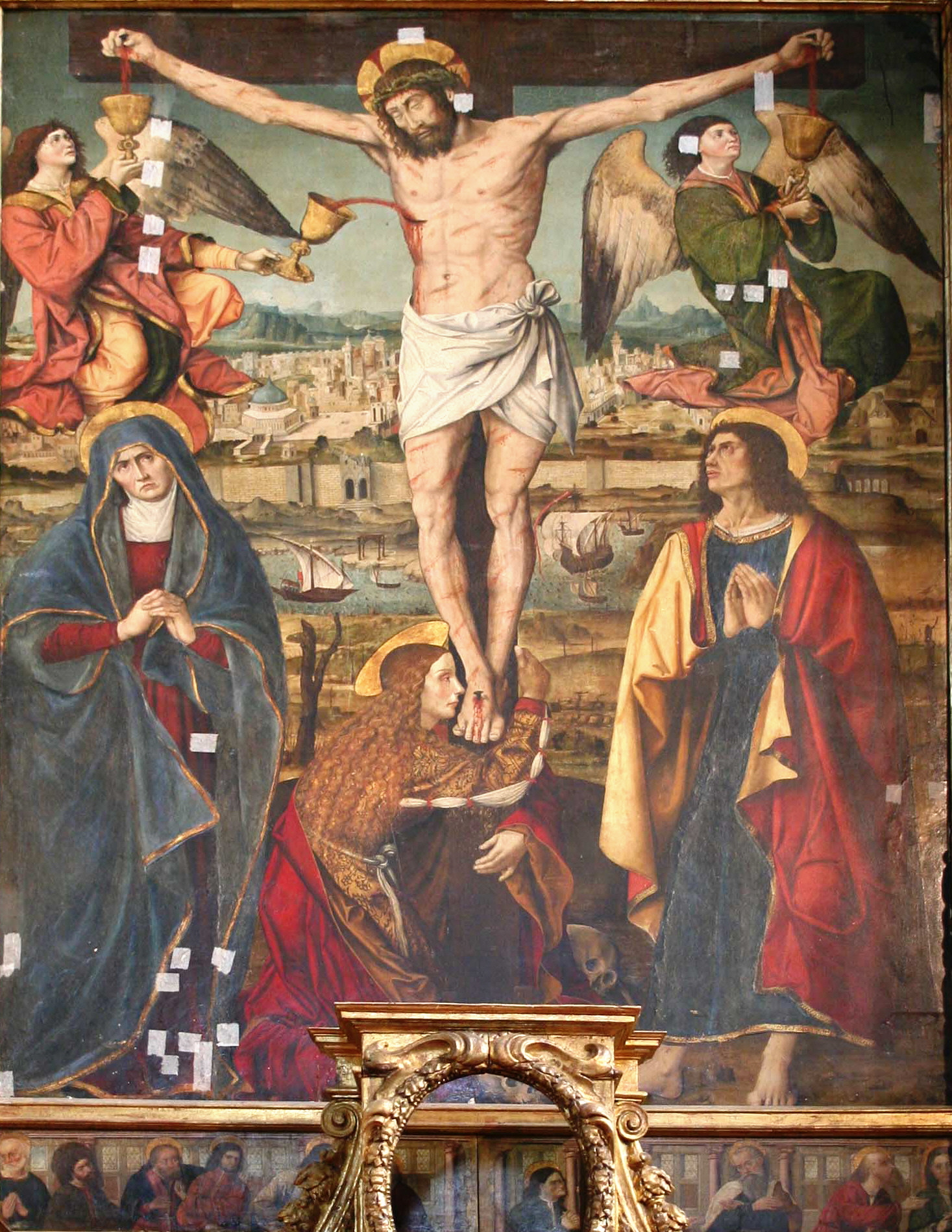 tableau de la crucifion du rétable de la Passion dans l'église de Sainte-Marie-Madeleine à Saint-Maximin dans le département du Var.